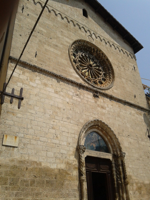 Chiesa di San Francesco a Tagliacozzo